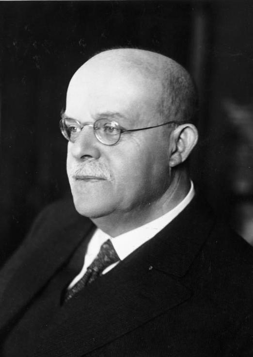 Wilhelm Marx Reichskanzler Wilhelm Marx, Porträt Abgebildete Personen: Marx, Wilhelm Dr.: Reichskanzler, Zentrum, Jurist, Deutschland